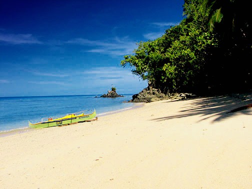 Kiamba, Sarangani Province